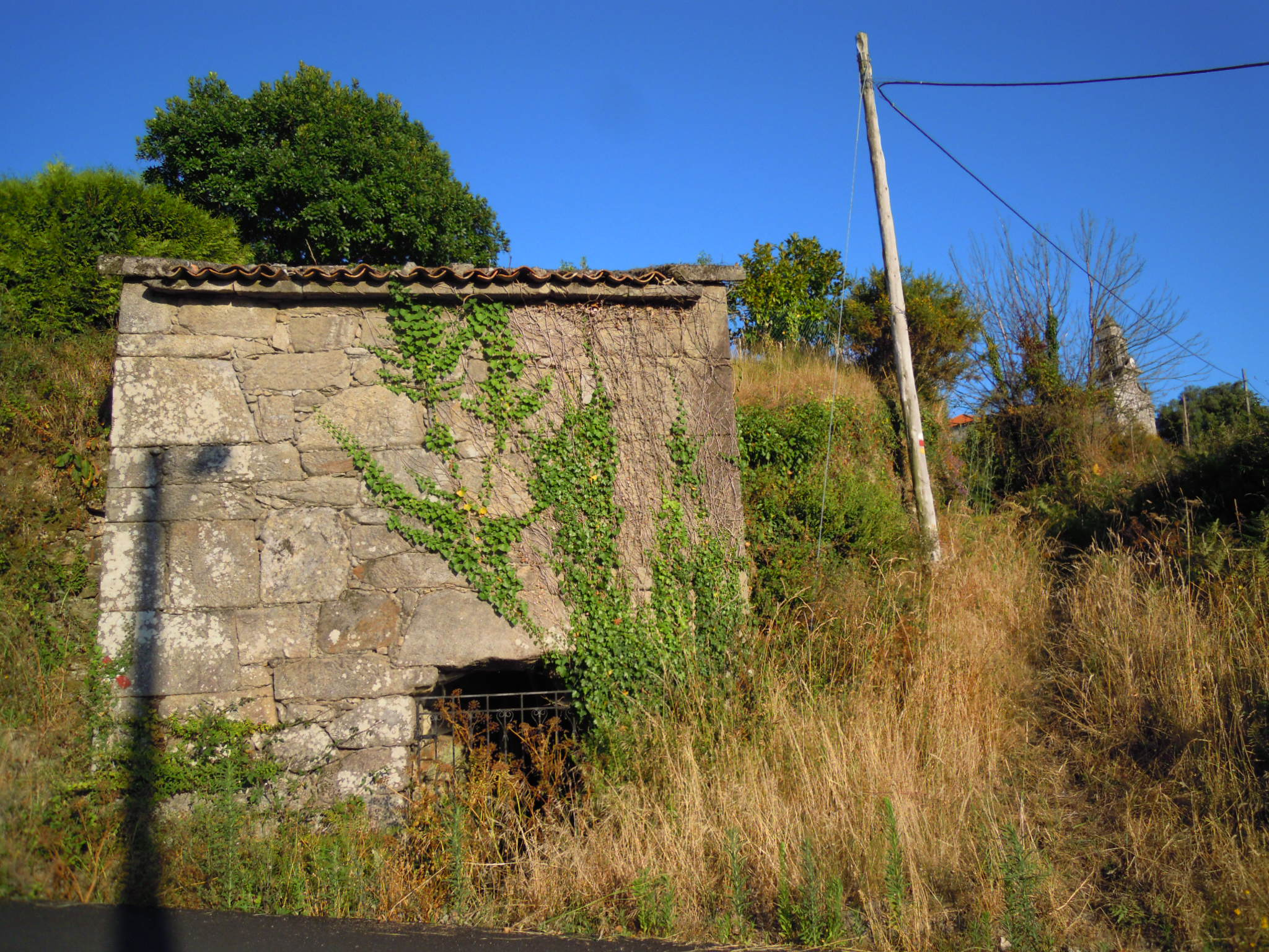 Muíño en Fontán, baixo a igrexa parroquial de San Xurxo de Sacos (Cerdedo-Cotobade).